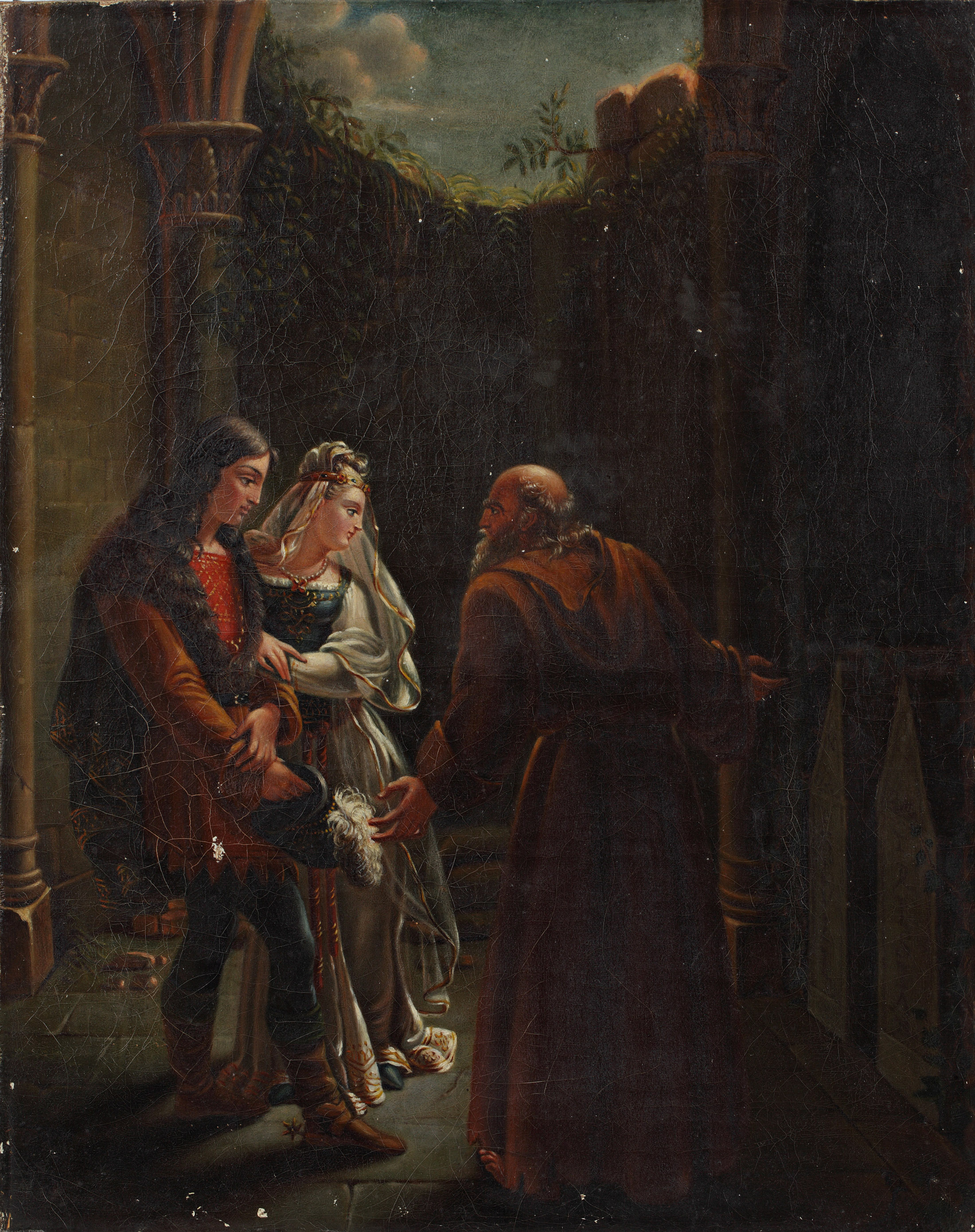 Titled on stretcher 'Lancelot et Geneviève... Mme Servières', also misspelled Guenièvre.